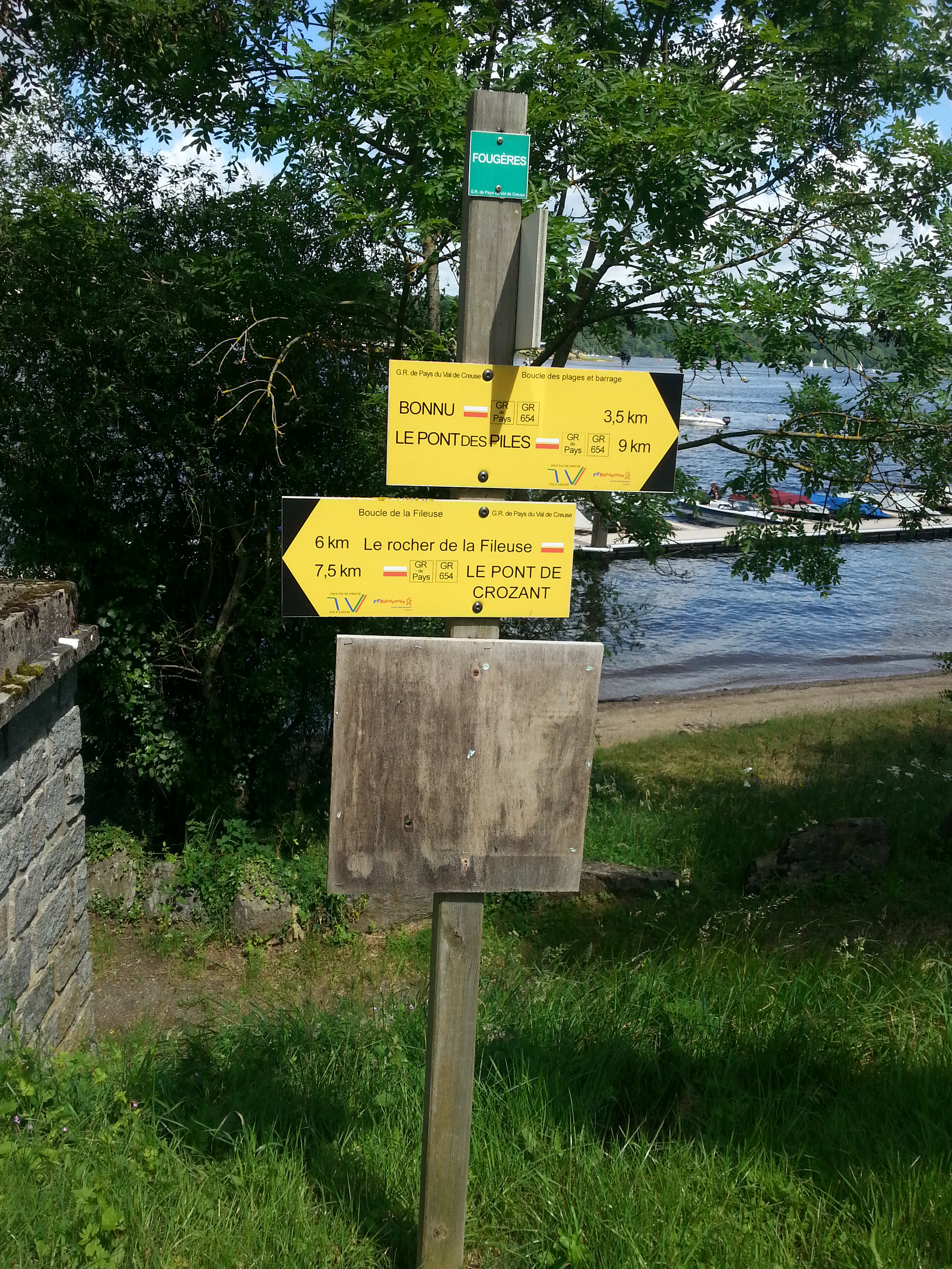 Fougères (commune de Saint-Plantaire) : Le panneau du sentier de grande randonnée de pays du Val de Creuse.